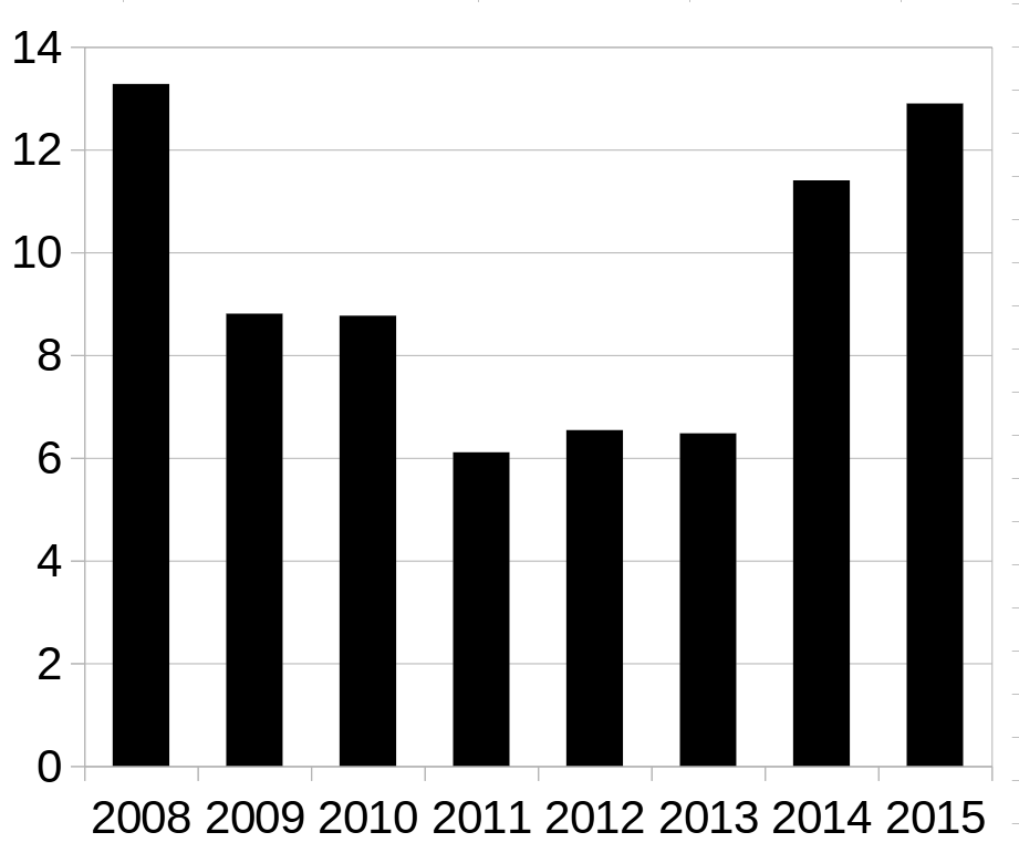 Годовая инфляция в РФ с 2008 года, %. Источники: 1, 2, 3